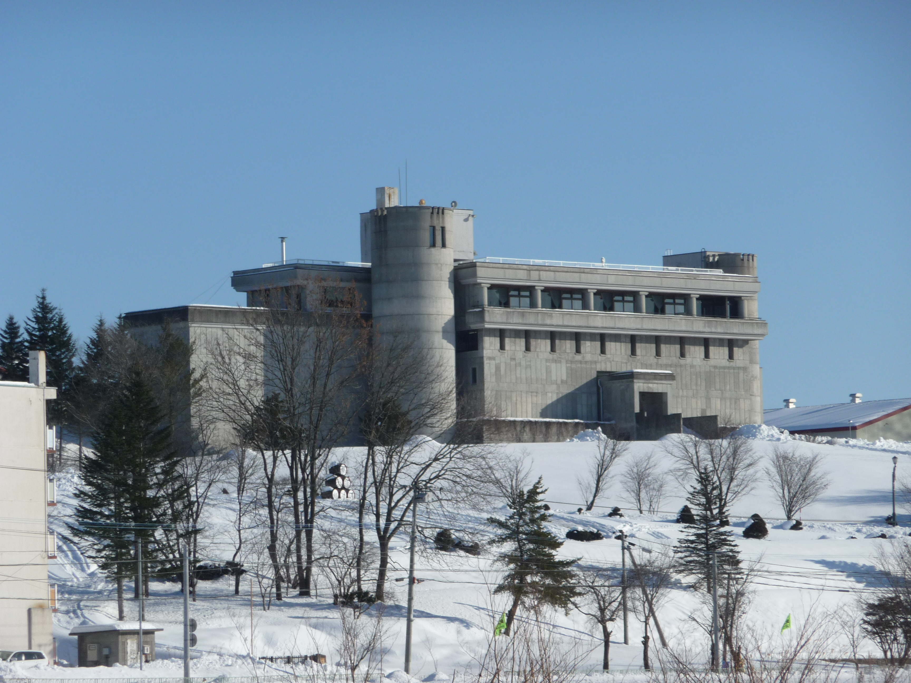 北海道池田町にあるワイン城JR北海道池田駅ホームから撮影